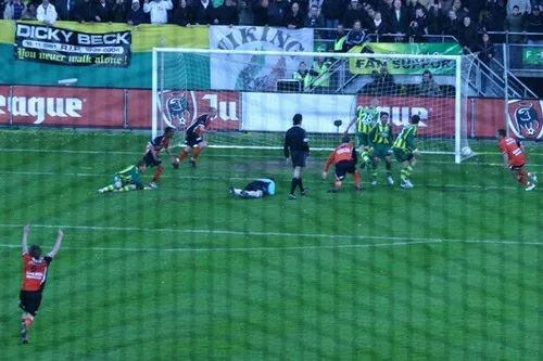 Jack Tuijp maakt het winnende doelpunt in de kampioenswedstrijd tegen ADO Den Haag (0-1). FC Volendam promoveert naar de Eredivisie.Beschrijving op Flickr: Foto: PéSide